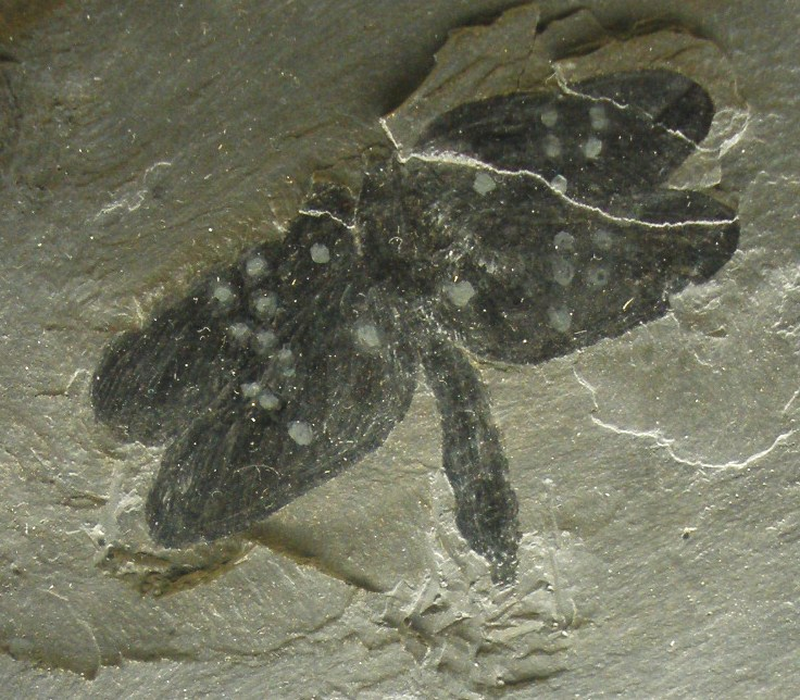 Fossil of Homaloneura, an extinct insect- Took the photo at Senckenberg Museum of Frankfurt